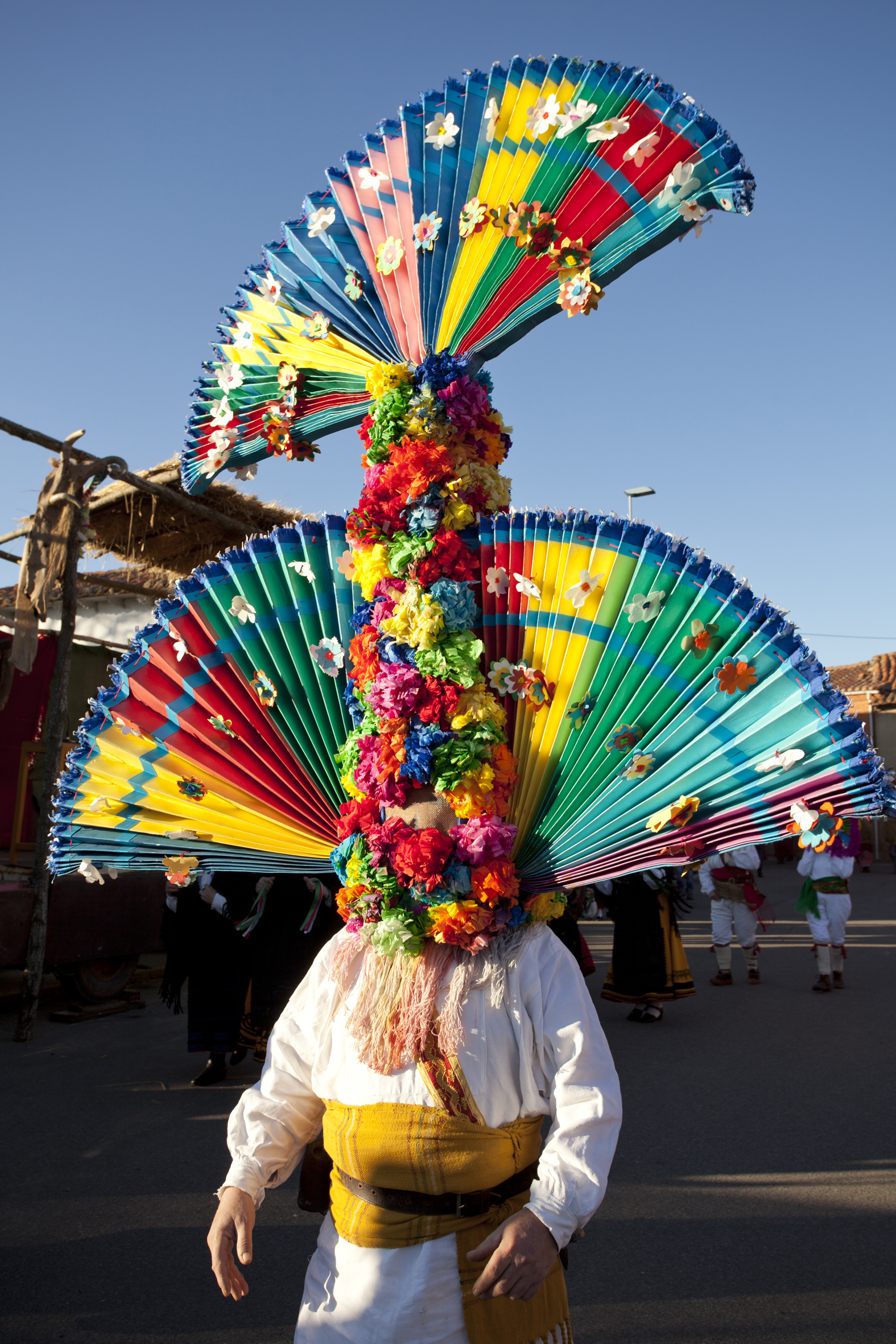 Antruejo de Velilla de la Reina, León, España. Febrero de 2012 This is a photography of a Folklore festival in Spain (Wikidata id Q23310069).